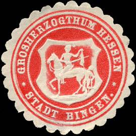 Sealing stamp Title: Grosherzogthum Hessen - Stadt Bingen Description: hellrot, weiß, geprägt Place: Bingen size: 4 cm